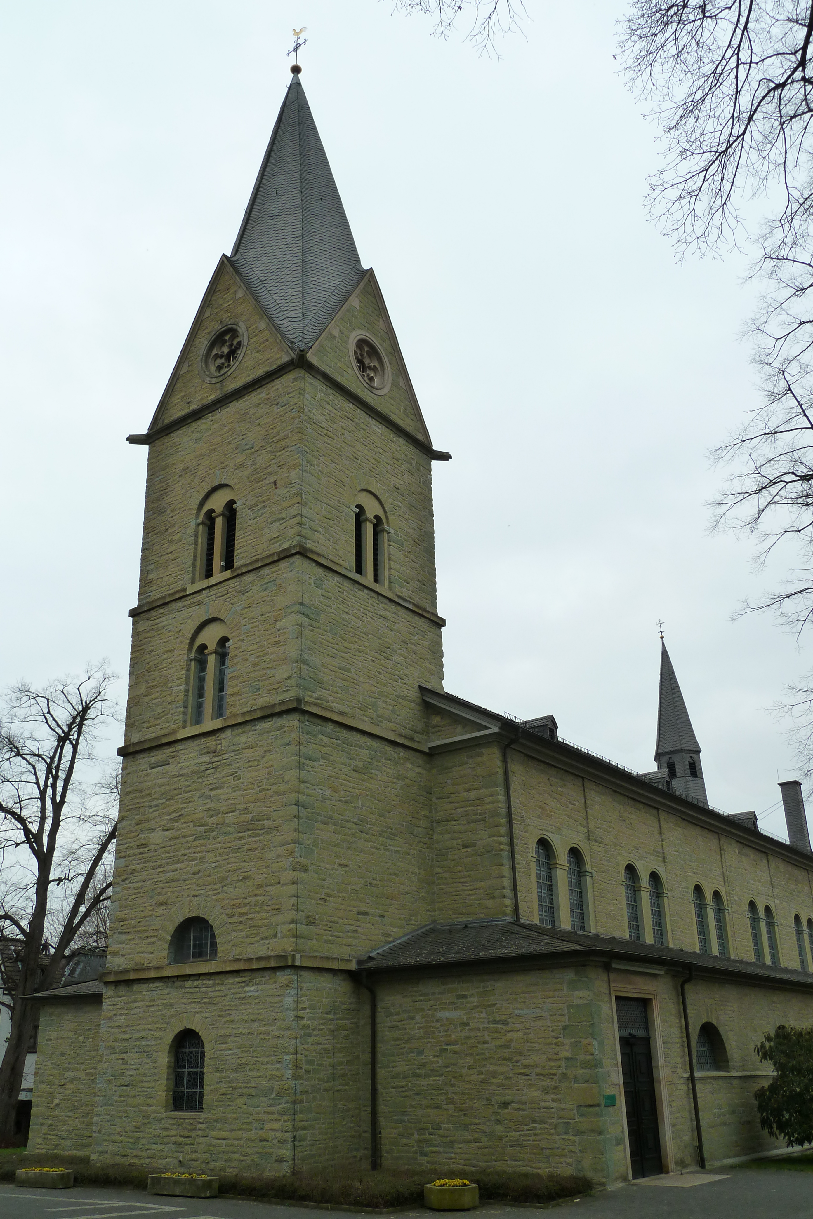 St. Cäcilia-Kirche in Werl-Westönnen. This image shows a heritage building in Germany, located in the North Rhine-Westphalian city Werl (no. A 101).